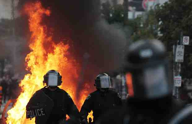 G20 RIOTS SAT 26 JUNE 2010